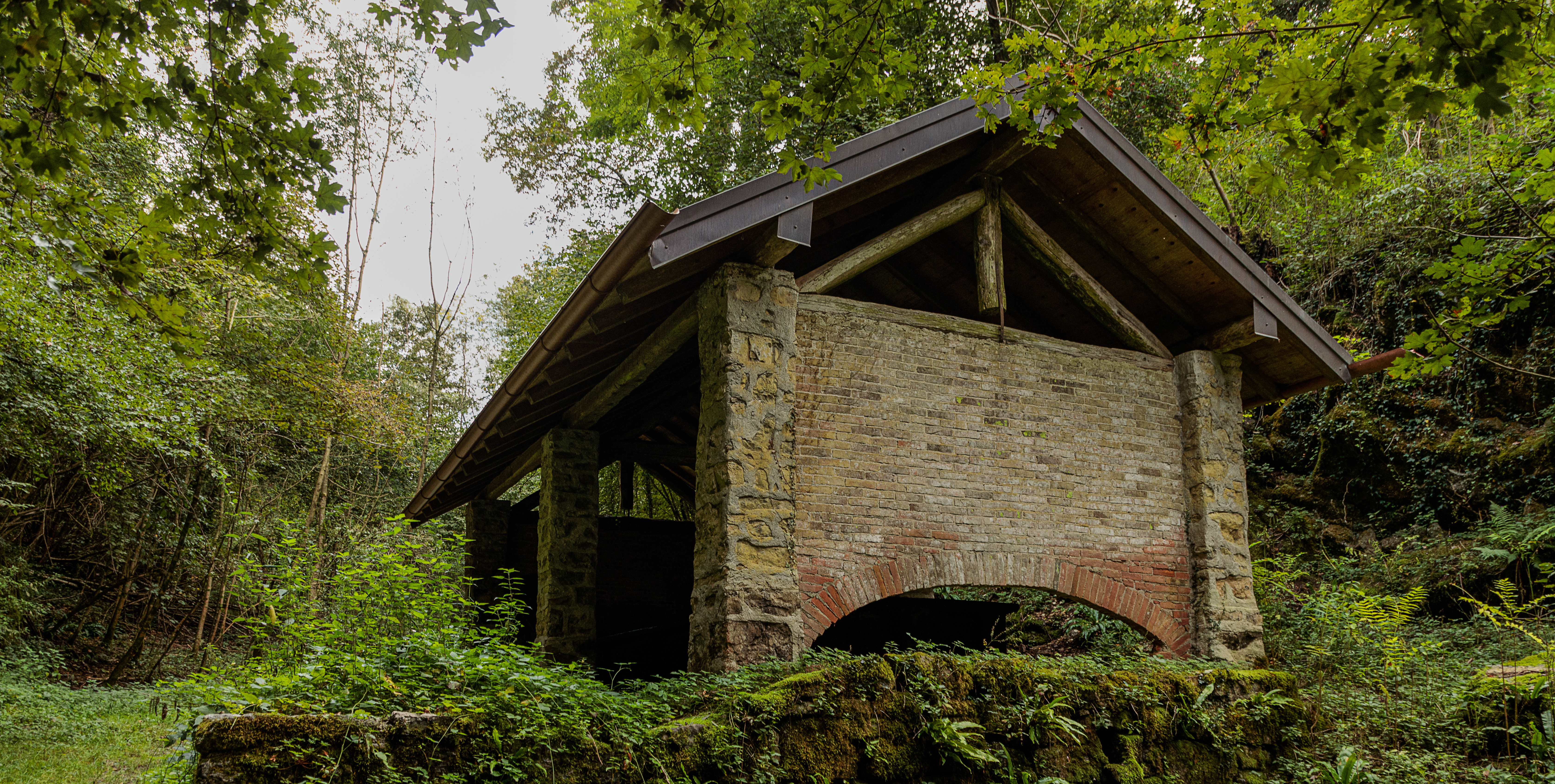 Lavatoi pubblici This is a photo of a monument which is part of cultural heritage of Italy.